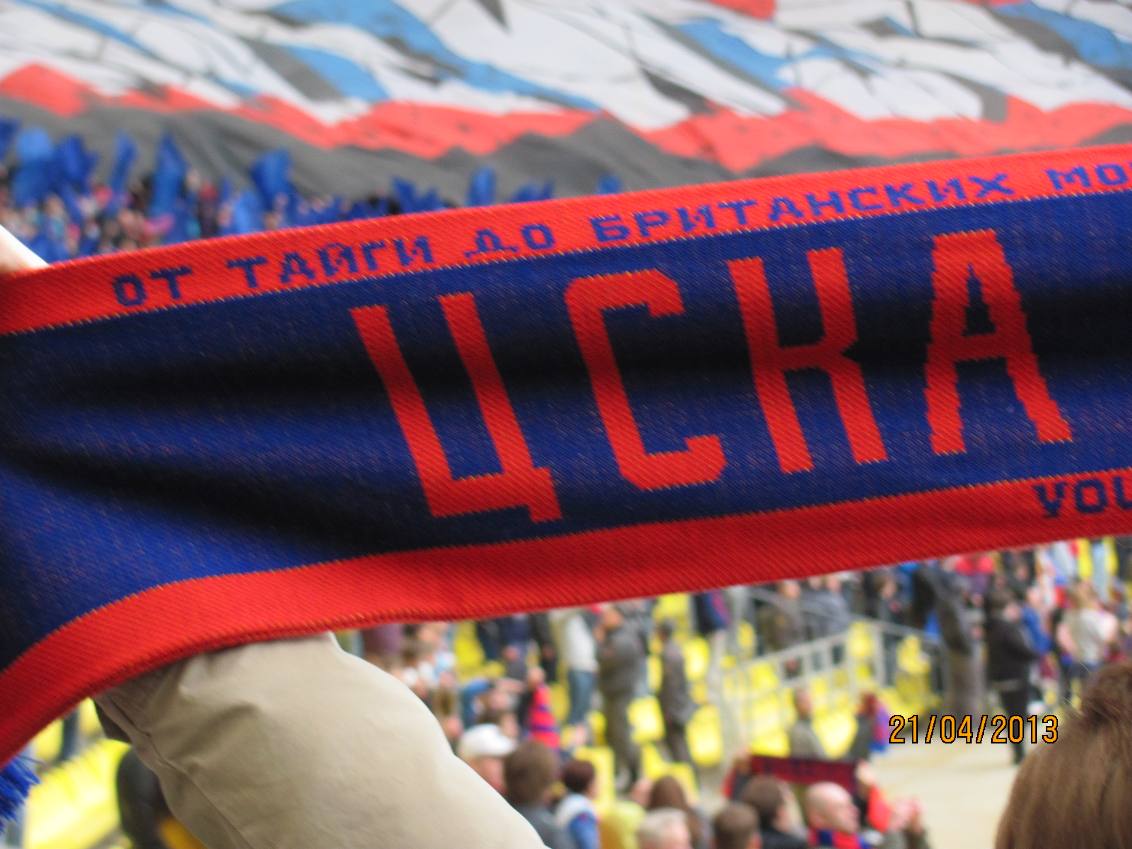 Шарф ЦСКА